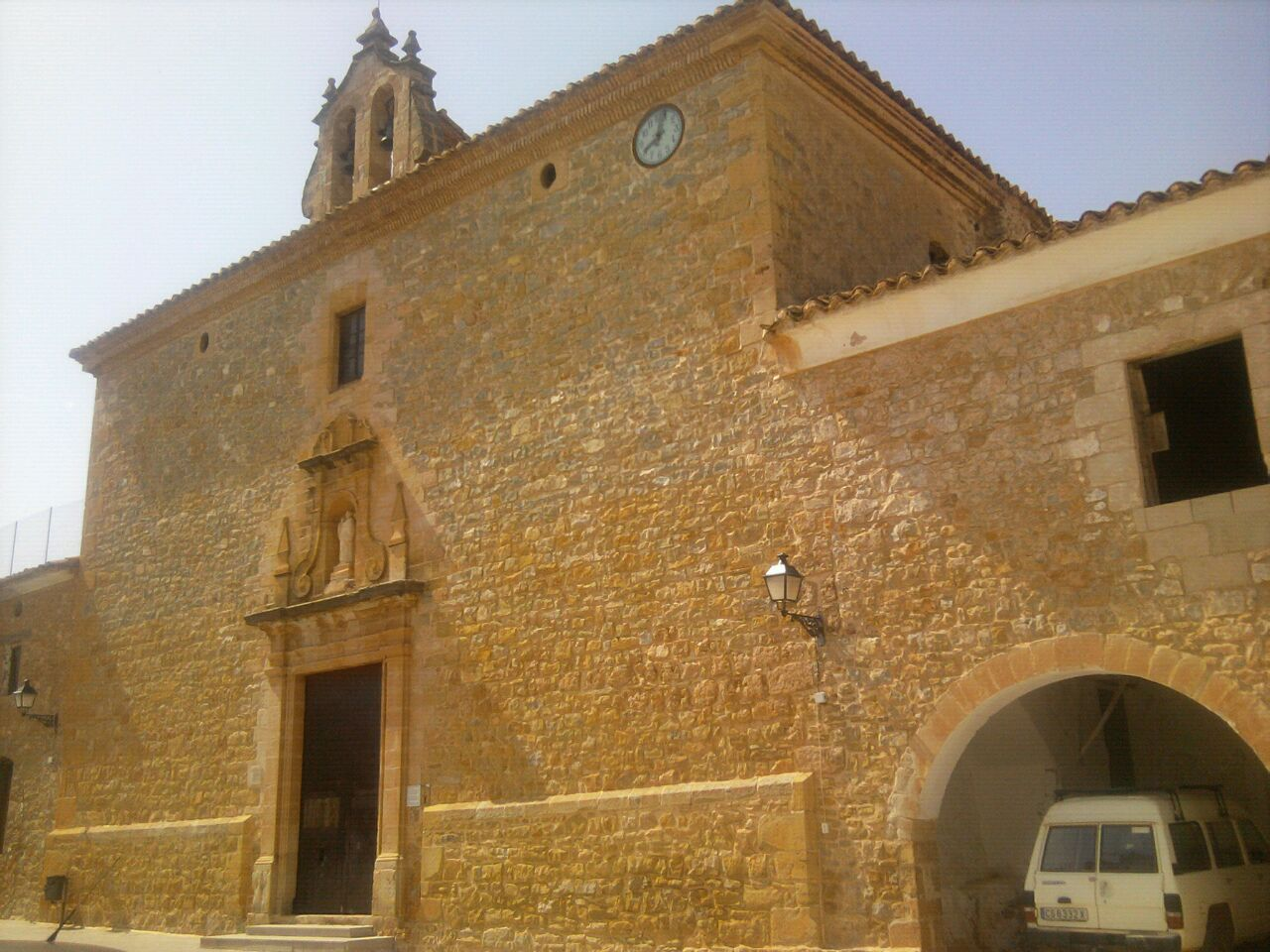 Sant Vicent, Cortes d'Arenós